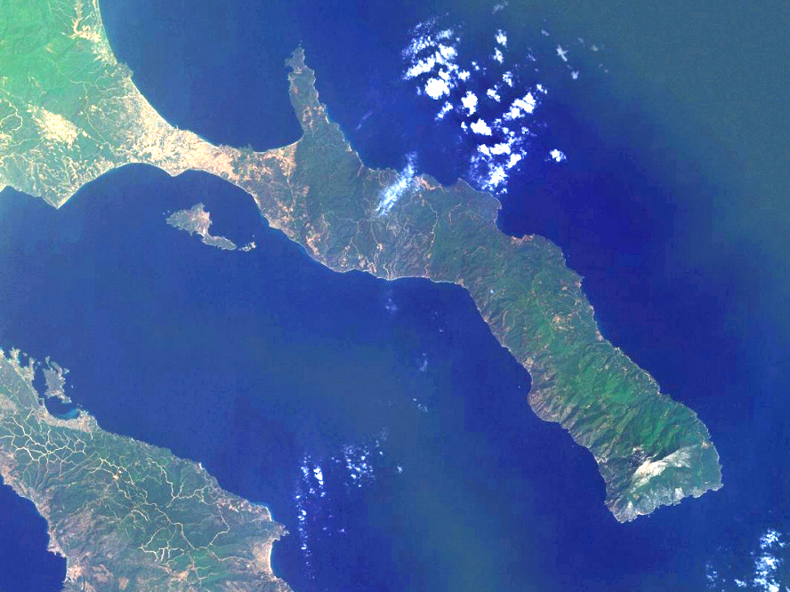 Peninsula Muntelui Athos vazuta din satelit